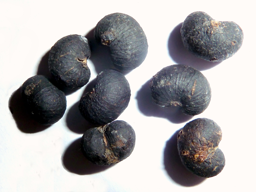 Trachycarpus fortunei (Palmera excelsa) - Frutos maduros sueltos - Ornamental, Glorieta de Rubén Darío, esquina Paseo de Eduardo Dato, Madrid (España).